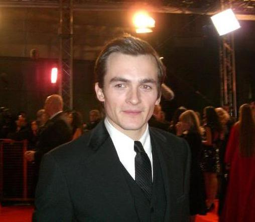 Rupert Friend lors des Bafta 2010.